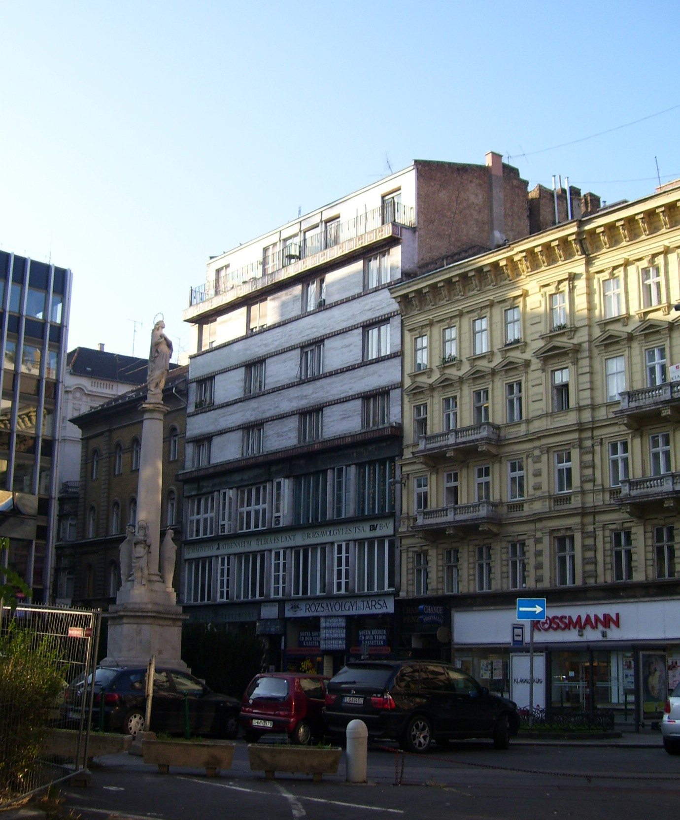 == Licenc: ==